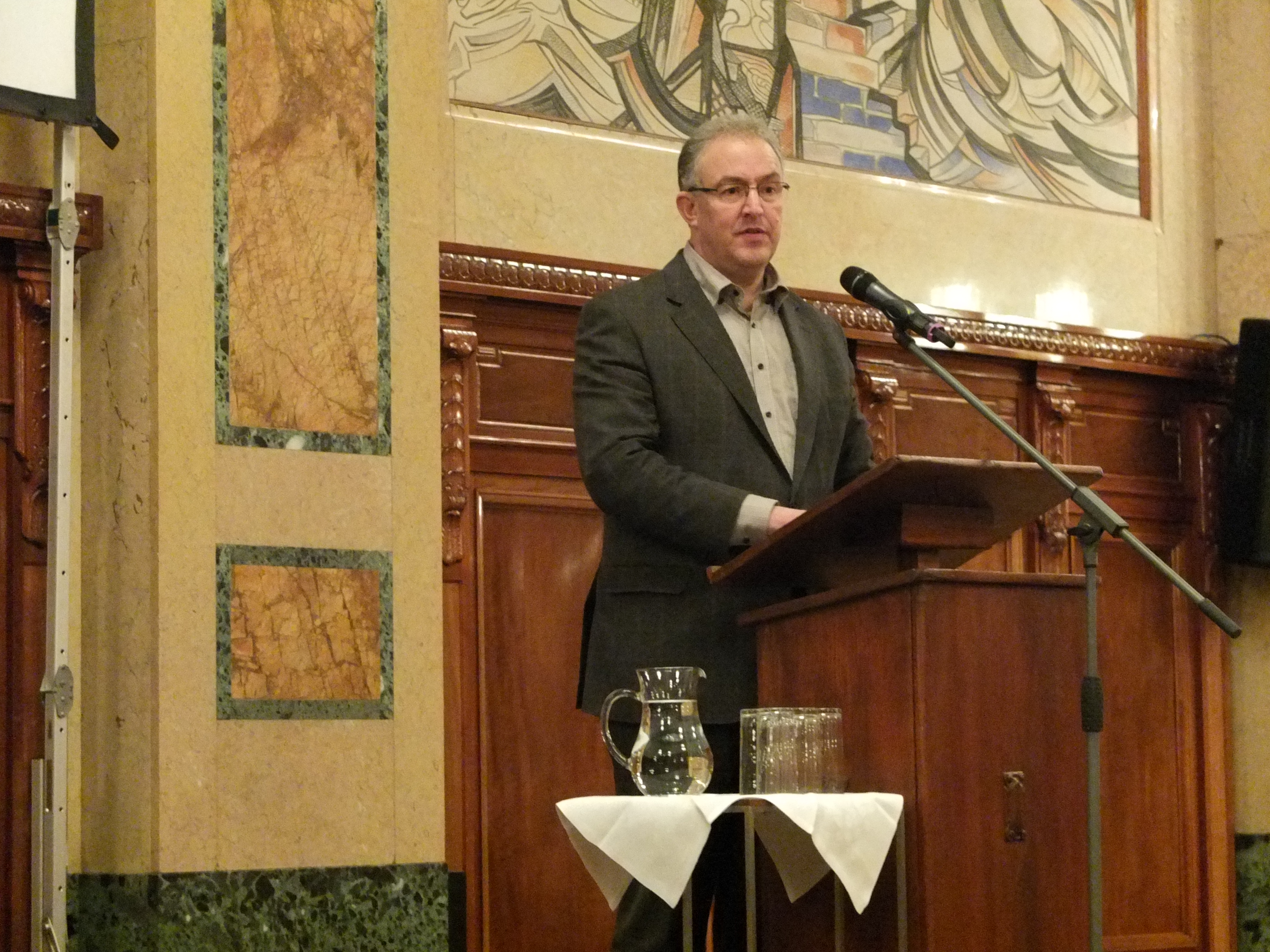 Burgemeester Ahmed Aboutaleb in de Burgerzaal van het stadhuis van Rotterdam